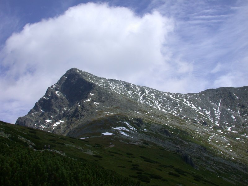 Krywan (2494) - Tatra Mountains